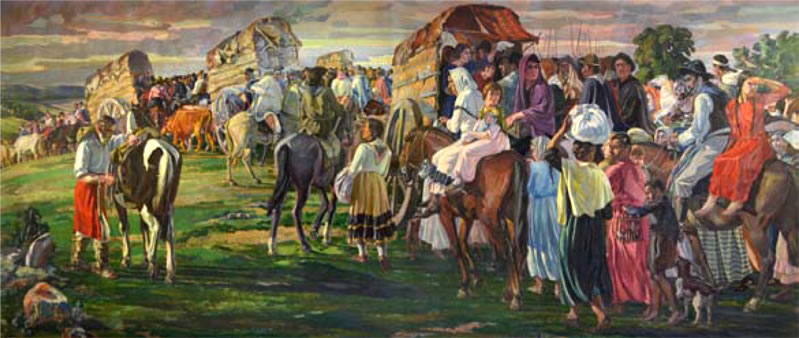 el exodo